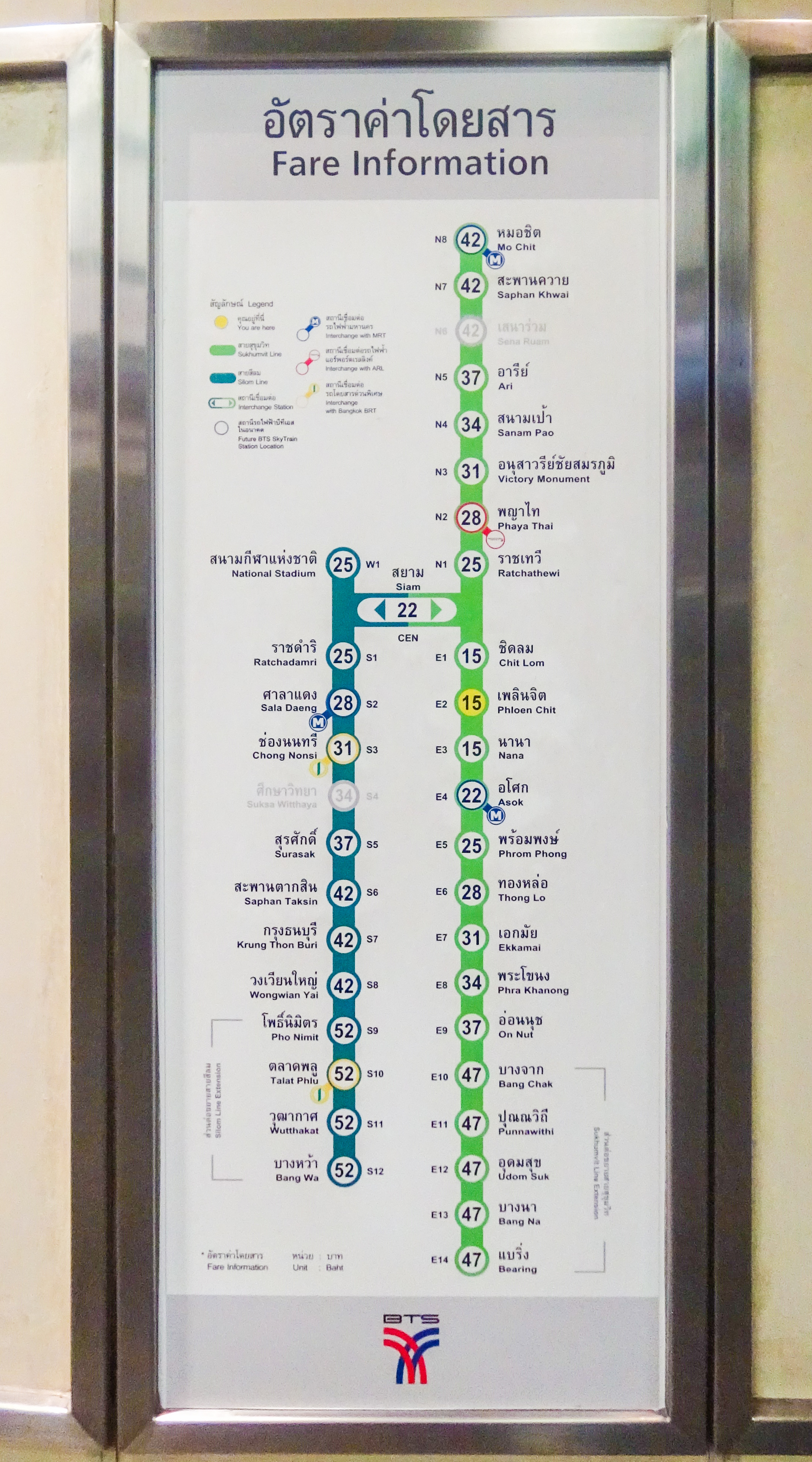 バンコク・スカイトレインの駅ナンバリング （路線・運賃図）